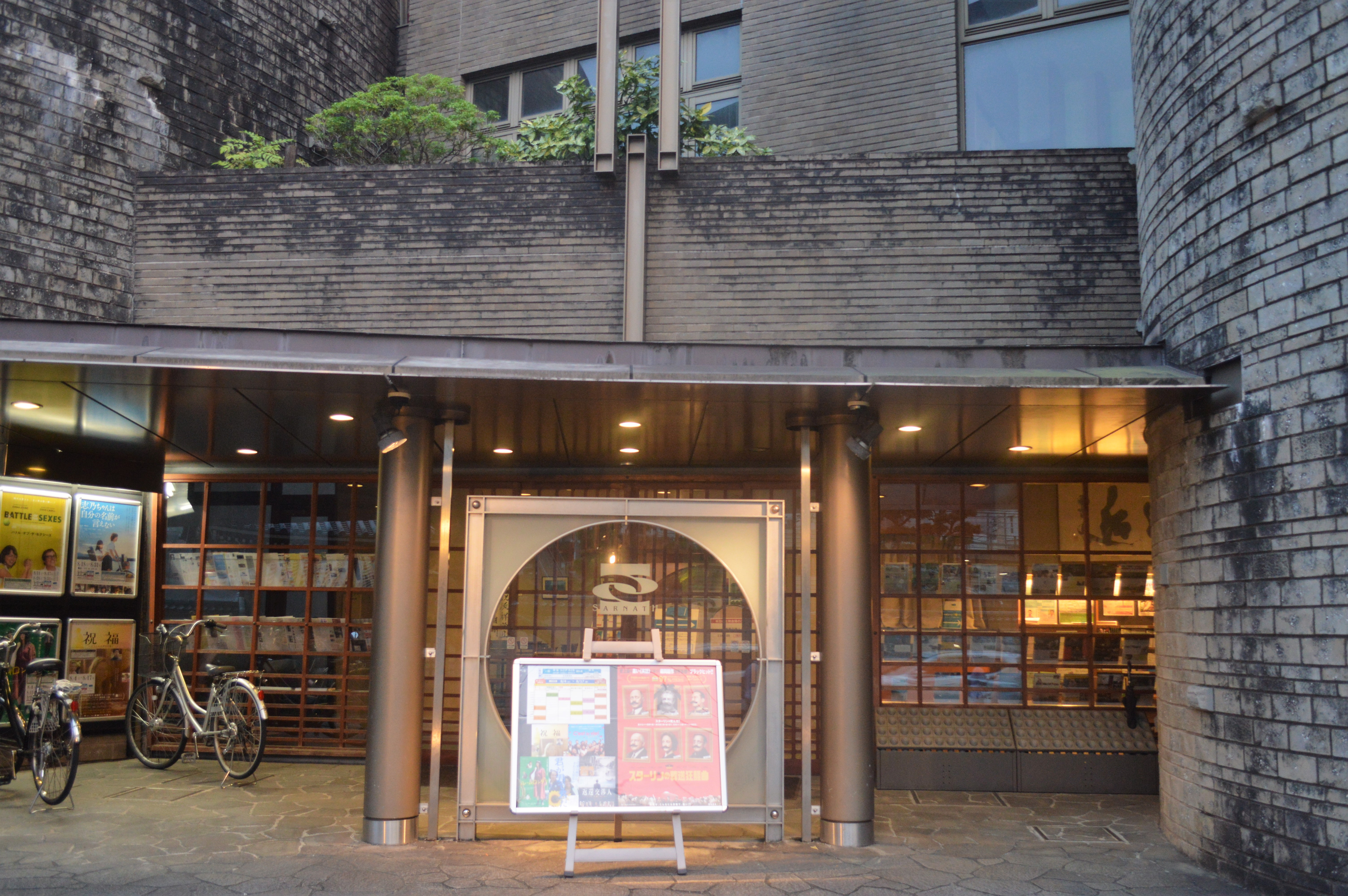 静岡市のサールナートホール。